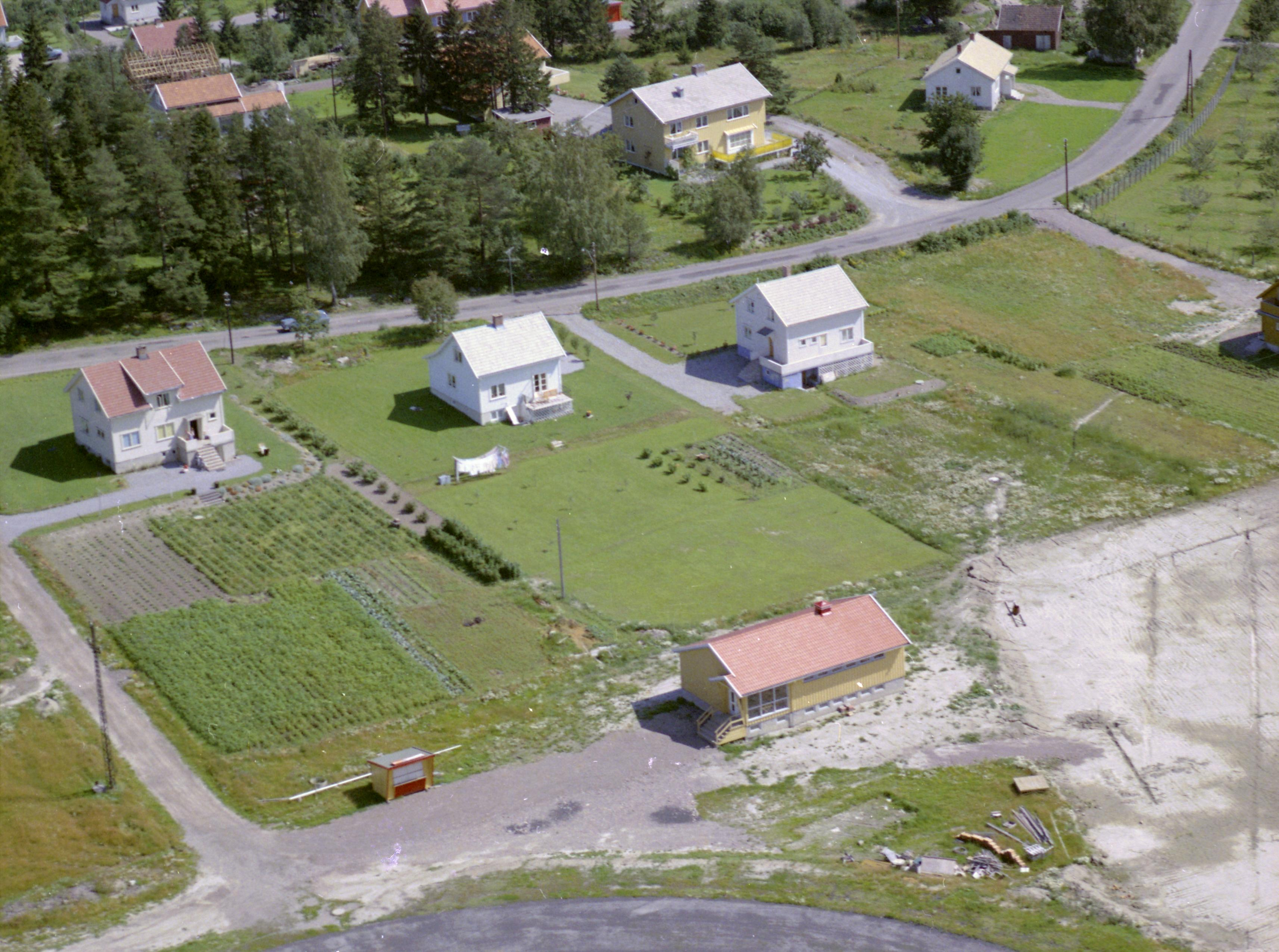 FW.HM.11909 Hvidsten, Botne